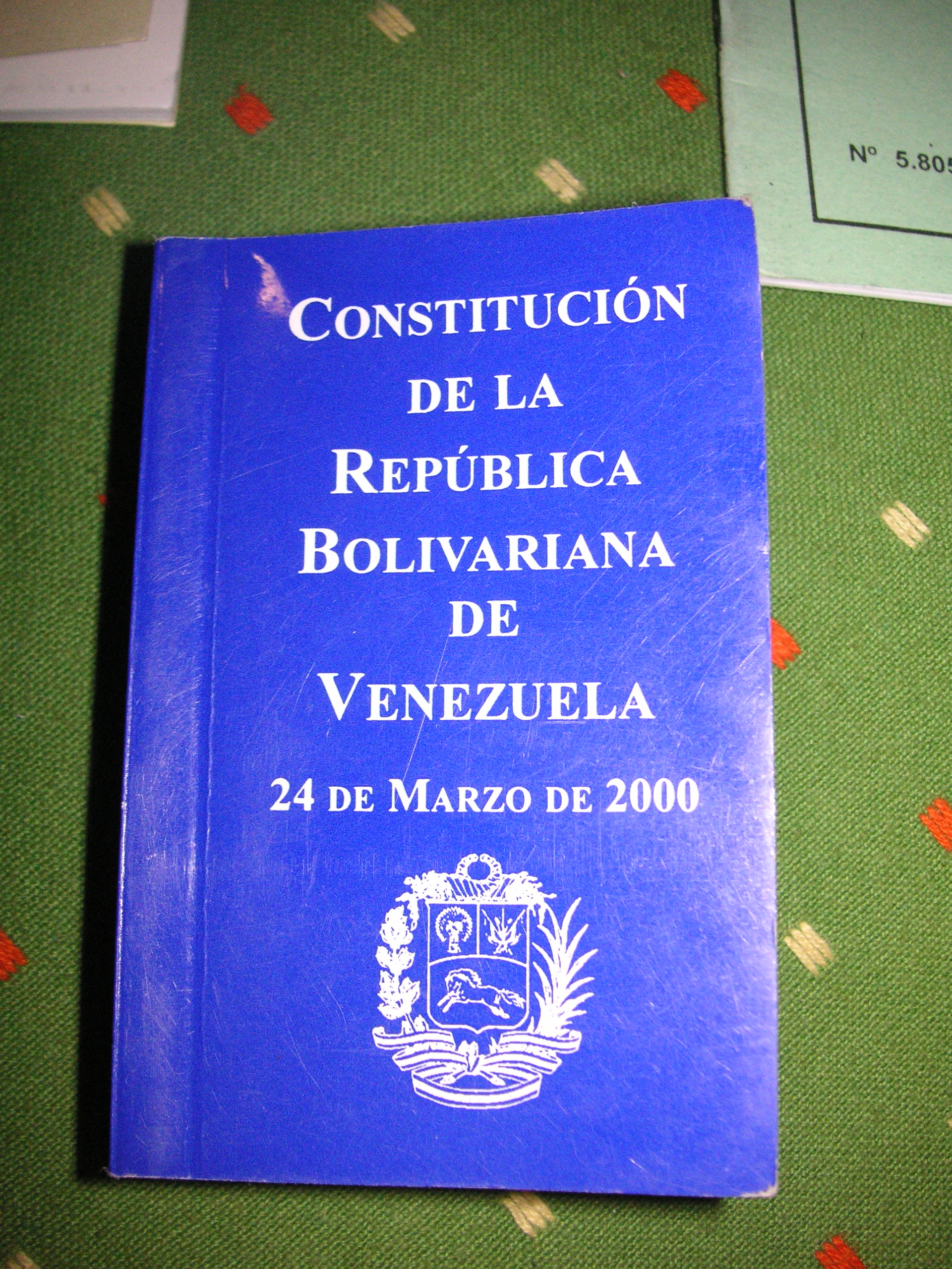 Blog Post